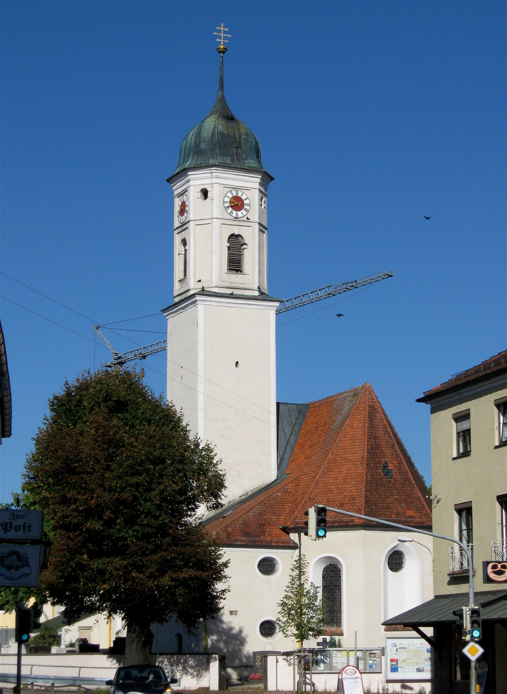 Münchener Straße 28. Kath. Pfarrkirche St. Gallus, spätgotischer Saalbau mit leicht eingezogenem Polygonalchor, angefügter zweigeschossiger Sakristei und südlichem Flankenturm, dendro.dat. 1473, barockisiert und Zwiebelhaube 1727 und dendro.dat. 1754, nach Westen verlängert 1849; mit Ausstattung.